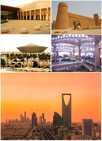 順時針方向從右依序：馬斯麥堡壘、哈立德國王國際機場、王國中心與利雅德天際線、內政部大樓、沙烏地阿拉伯國家博物館